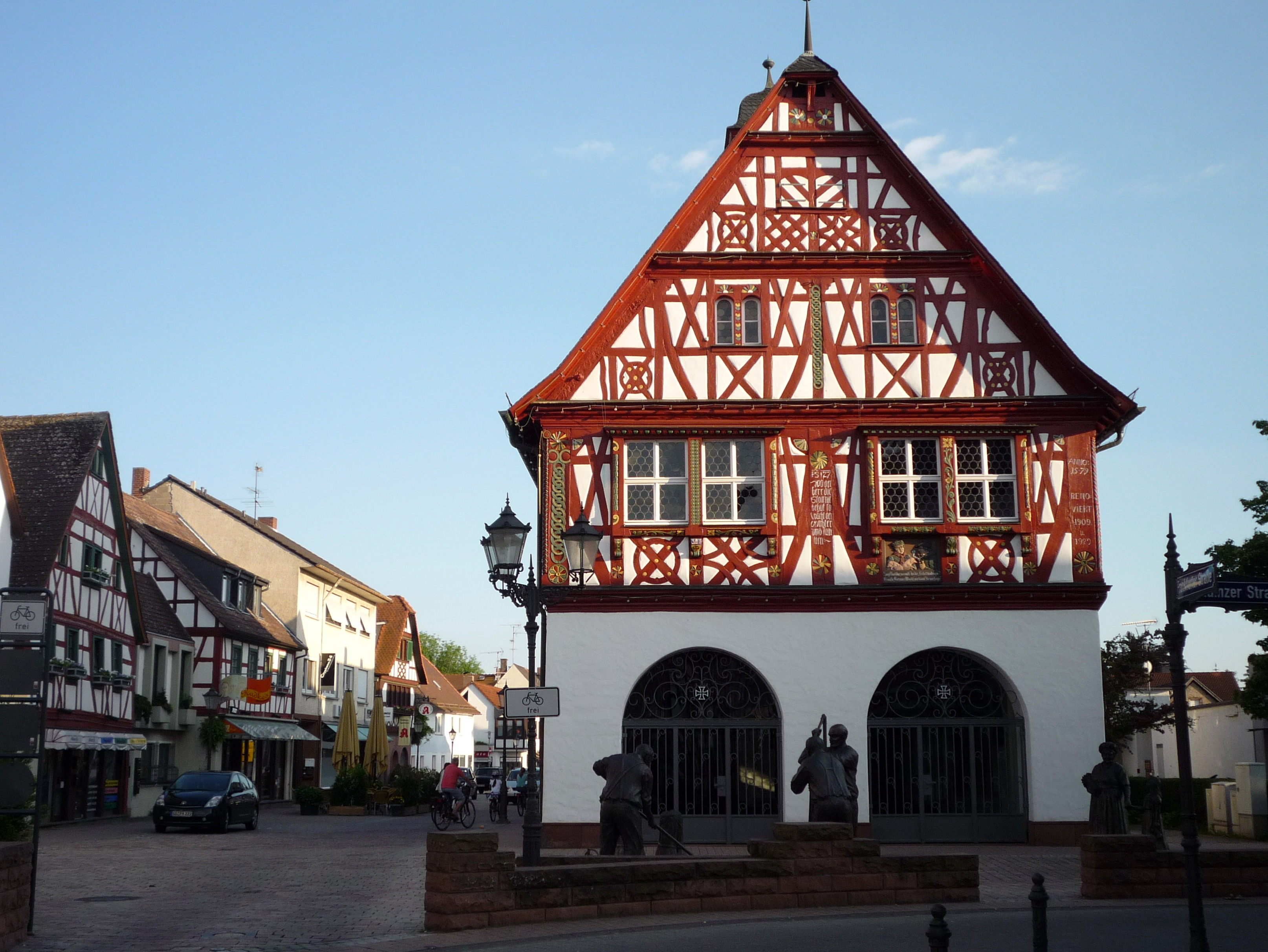 Groß-Gerau: historisches Rathaus mit den Bronzefiguren.